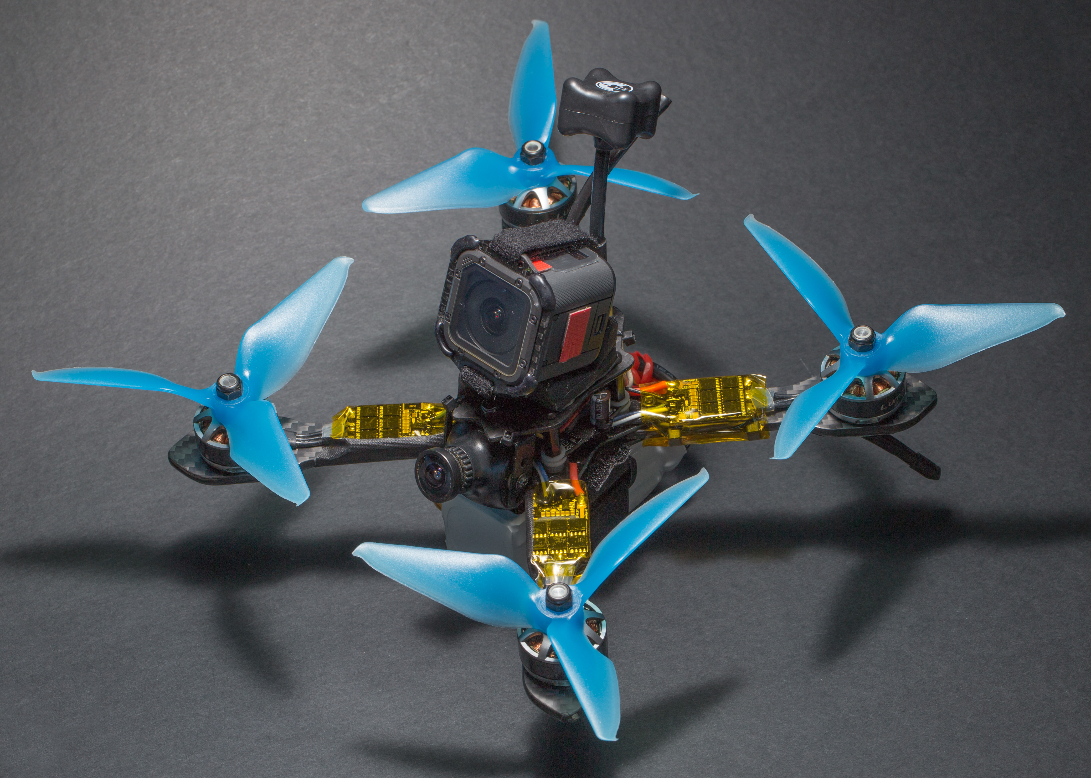 xLabs Shrike V2 200 mm Quadrokopter-Rahmen aus Karbonfasern mit Komponenten